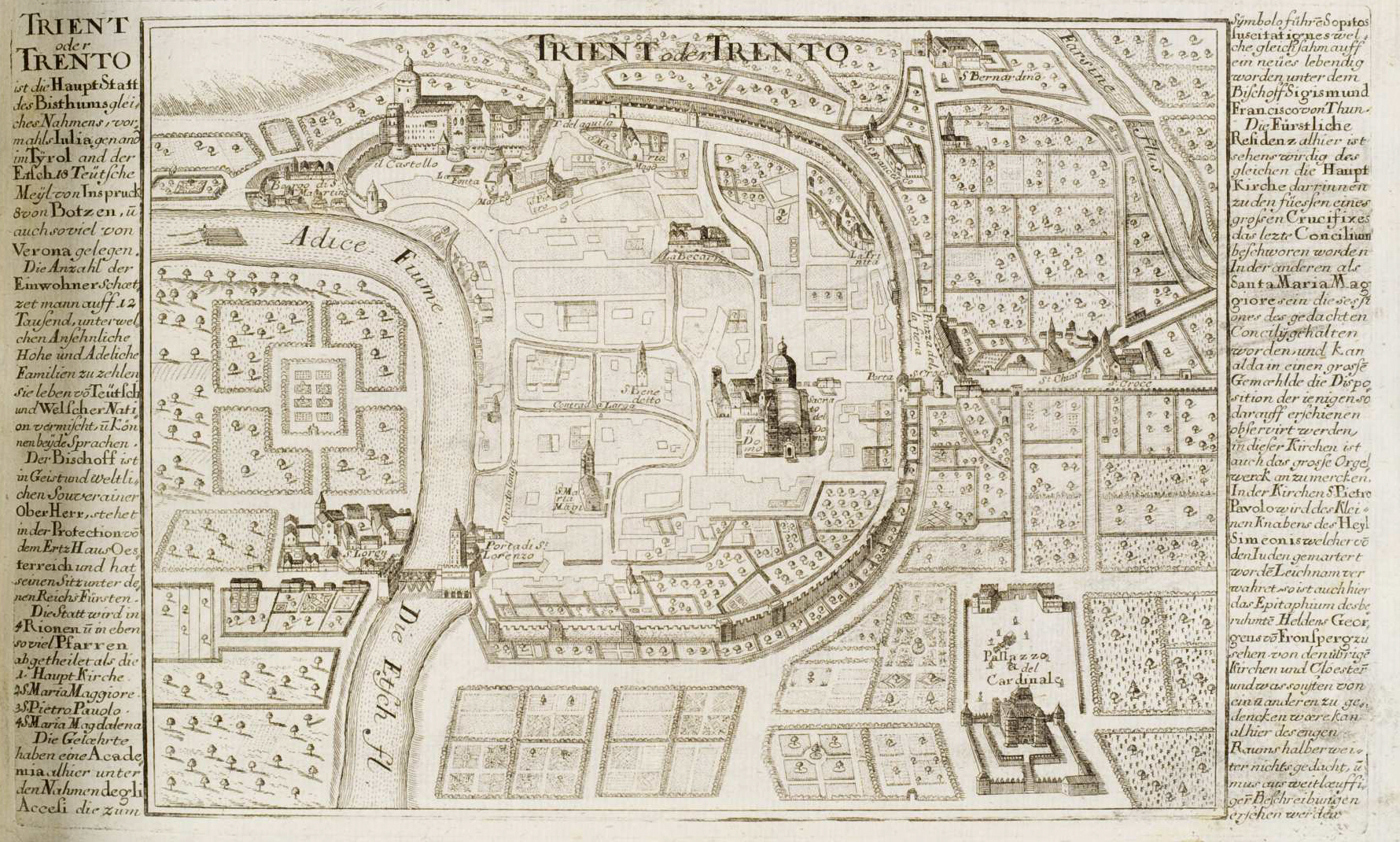 Curioses Staats und Kriegs Theatrum Dermahliger Begebenheiten im Tyrol : durch Unterschiedliche Geographische, Hydrographische, Topographische, Chronologische, Genealogische, Historische &c. Carten, Abrisse, und Tabellen Erlaeutert, Augspurg : Stridbeck, [ca. 1700] Trient